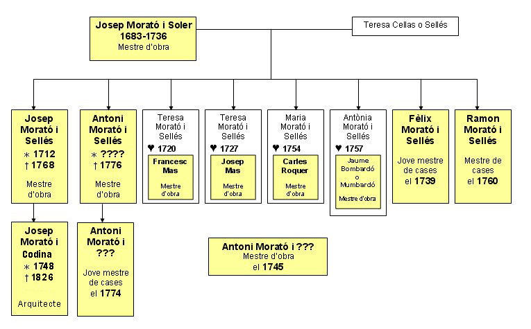 Esquema genealògic de la segona brana de la tercera generació dels Morató, artistes oriünds de Vic